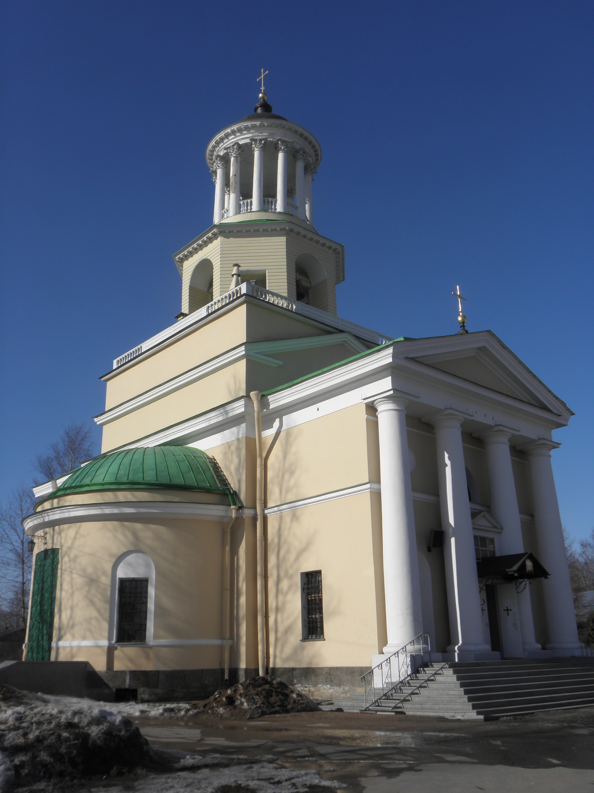 Церковь великомученицы Екатерины: Кооперативная улица, 21, Мурино, Всеволожский район, Ленинградская область